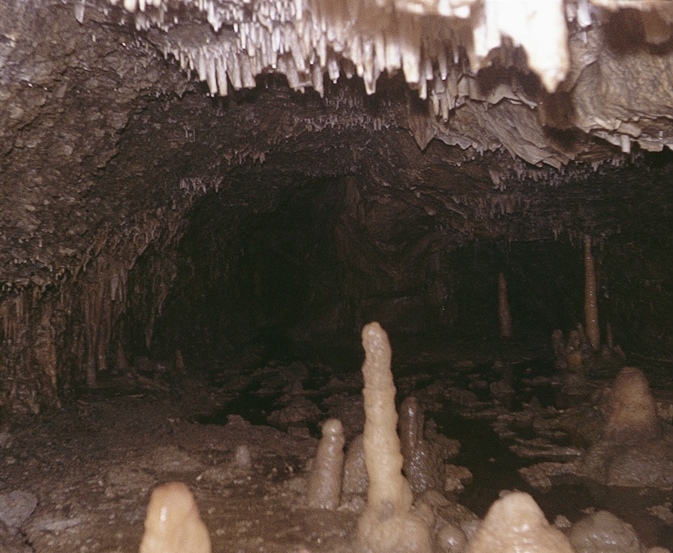 Eberstadter Tropfsteinhöhle: nicht ausgebauter Bereich am Ende der Höhle